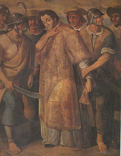 Procedent del retaule major de sant Feliu de Codines, obra de Pere Cuquet i Joan Basi.